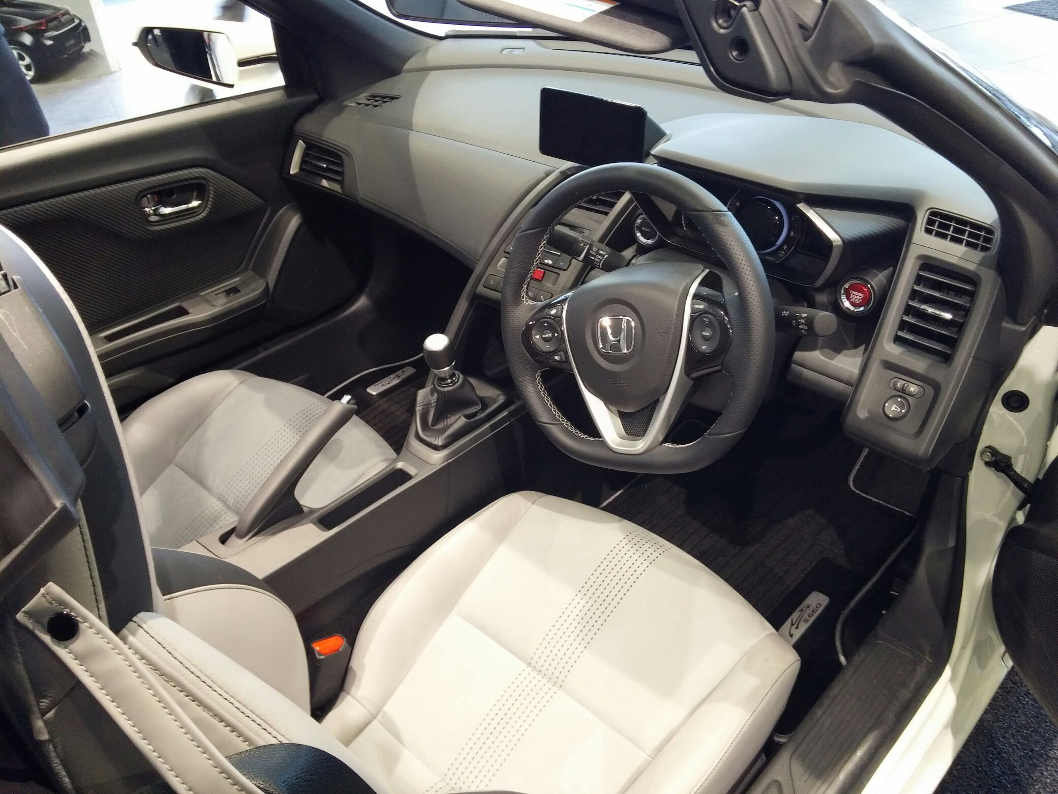 ホンダ・S660